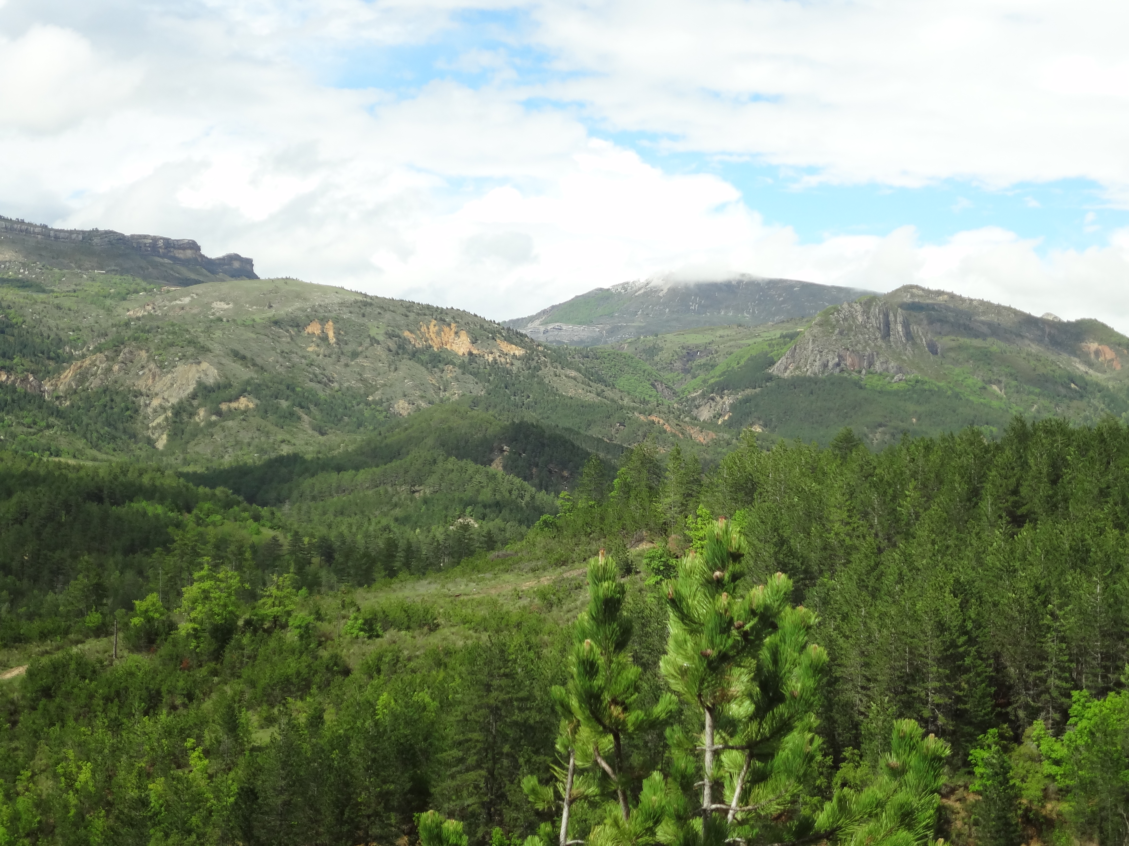 Le Trainon, sommet enneigé, 1654 m